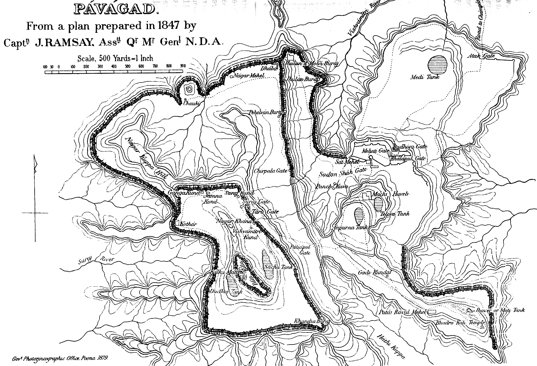 Pavagadh plan 1847 by J Ramsay (Pavagadh, Gujarat, India)